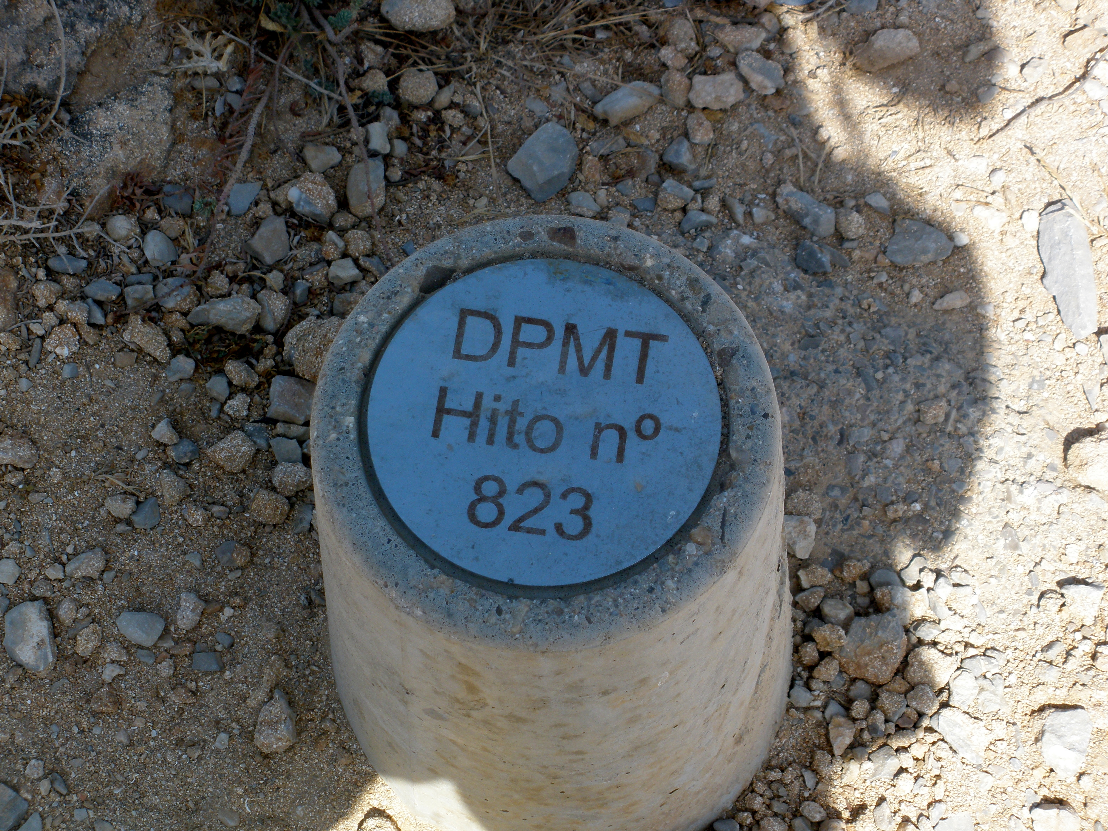 Hito de deslinde del Dominio Público Marítimo-Terrestre entre cala Torta y cala Mitjana This is a photography of a Special Area of Conservation in Spain with the ID: ES0000227. Natura2000 entry, EEA entry